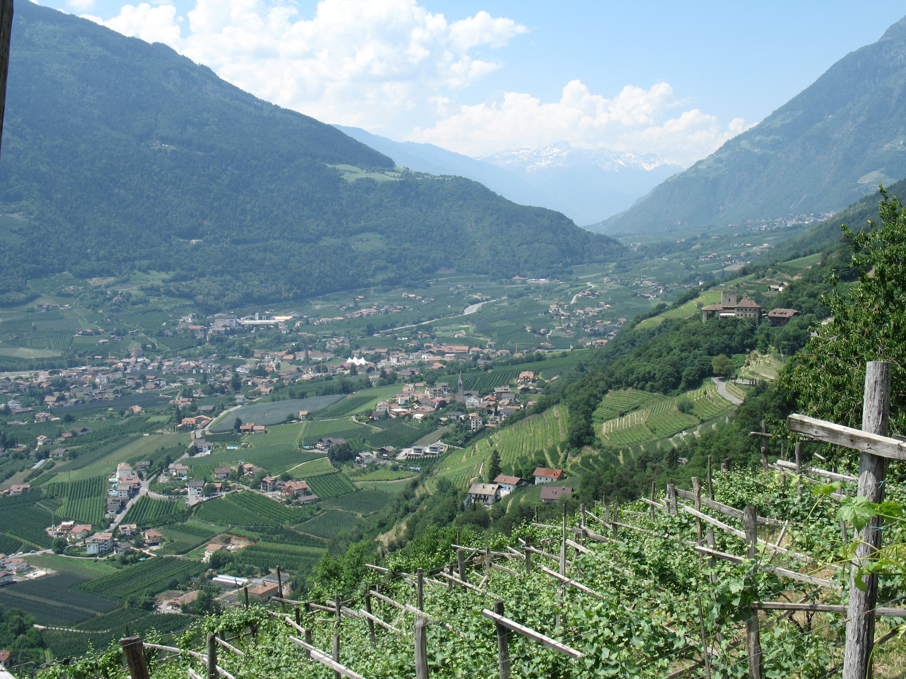 Algund.